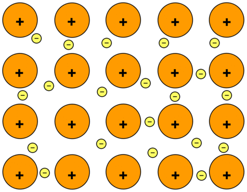 Lotura metalikoko elektroi-hodeia.